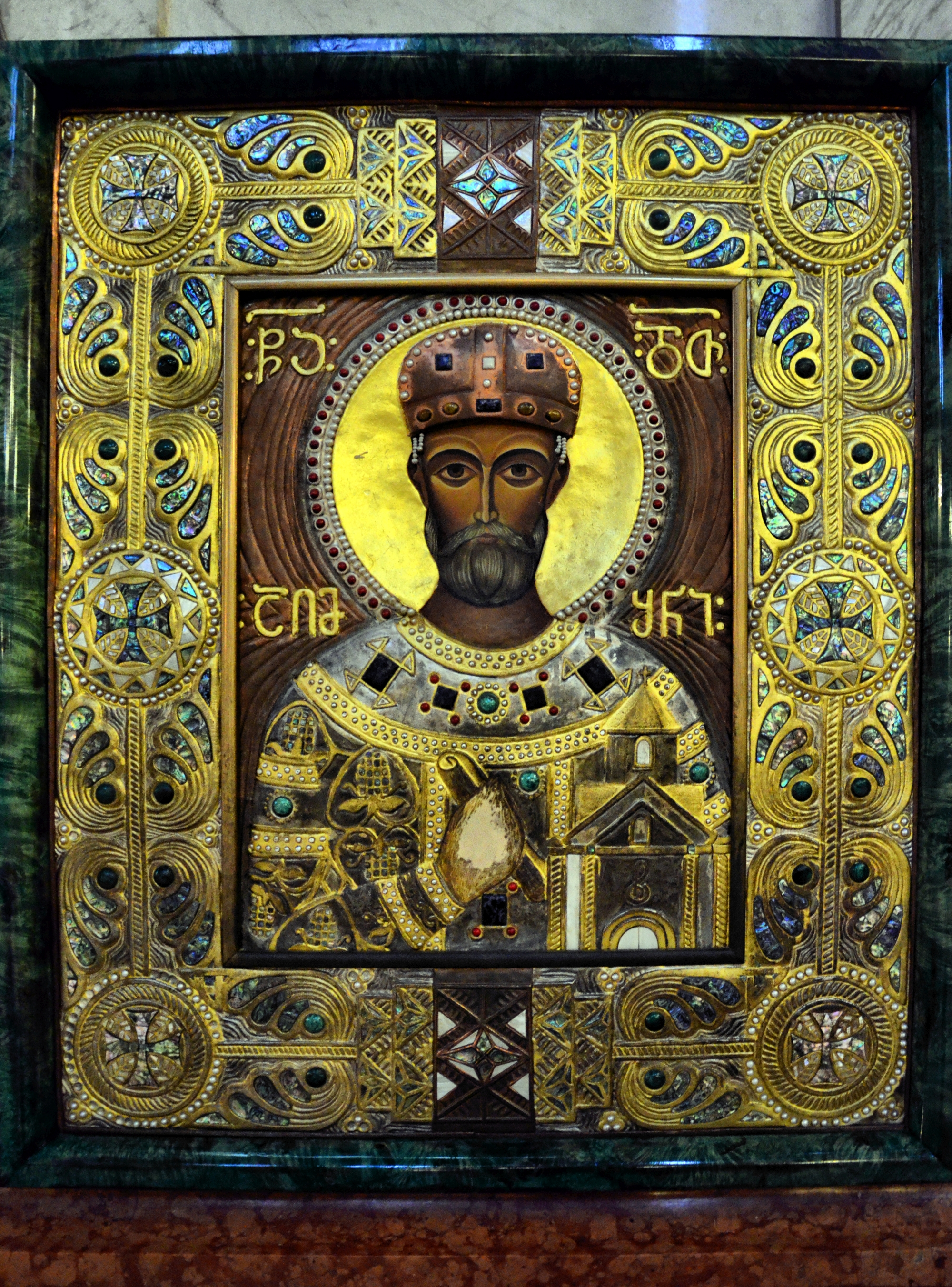 Tbilisi, Sameba